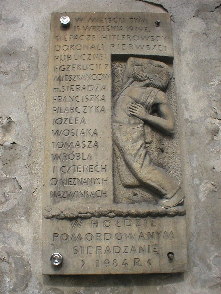 Sieradz. Tablica ku pamięci ofiar II wojny światowej